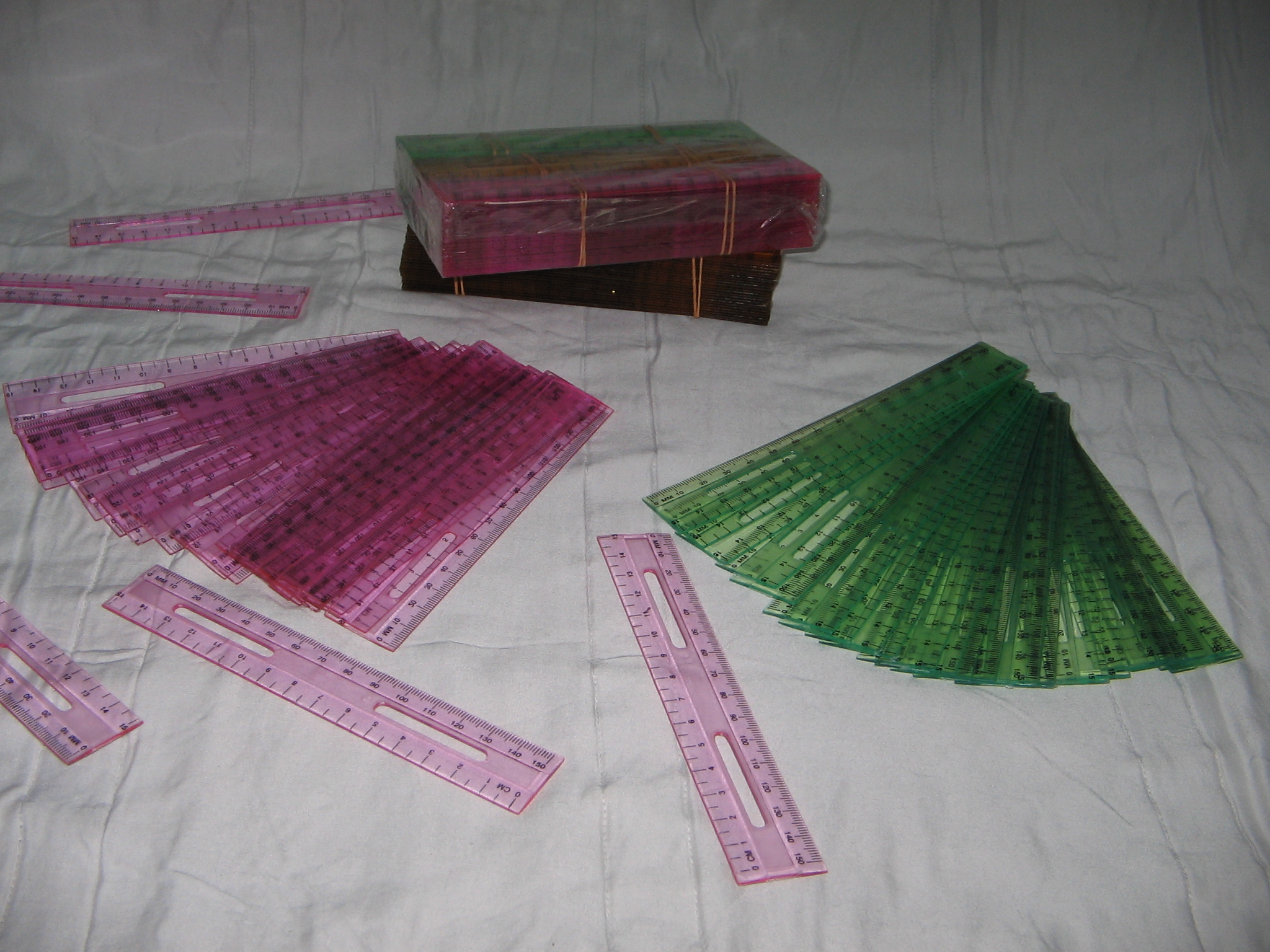 Pembaris @Mohd Yosri